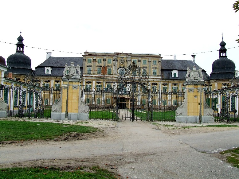 L`Huillier-Coburg-kastély, Edelény. Saját kép